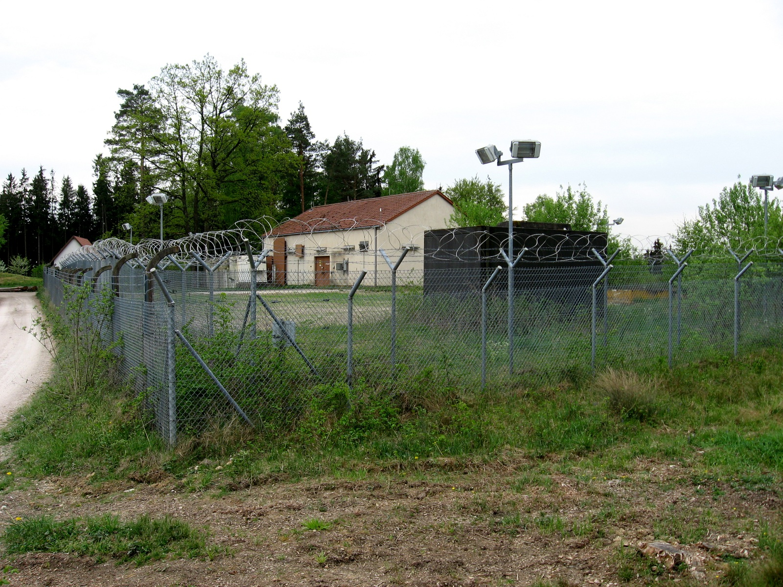 ehemalige Relaisstation der US-Streitkräfte auf dem Stauffersberg bei Augsburg